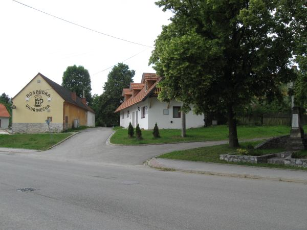 Vavřinec